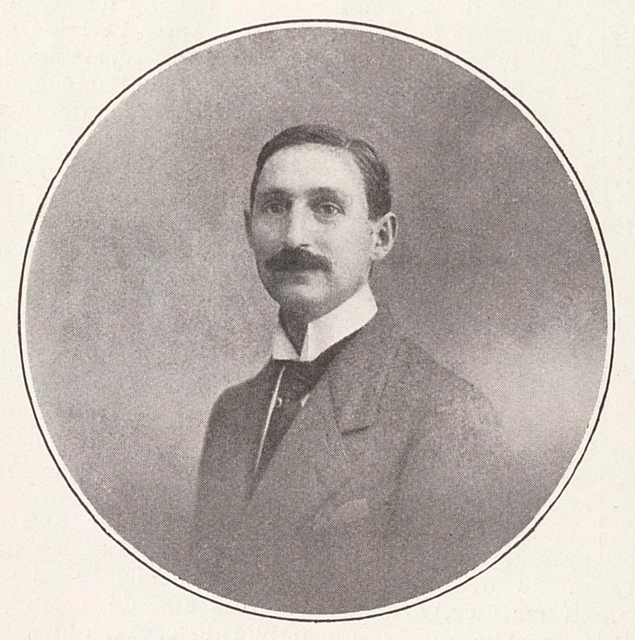 René Dumesnil, Comoedia, septembre 1921.